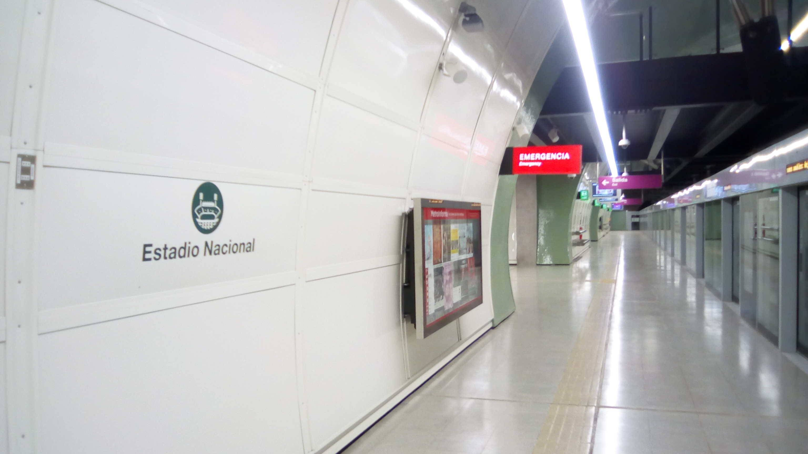 Estación Estadio Nacional